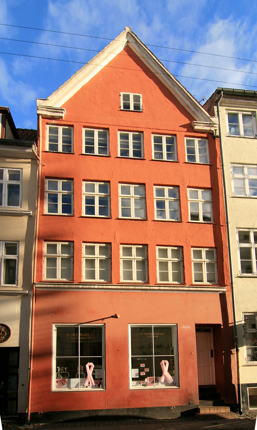 Valkendorfs Gade 17, København. Bygget 1761. Fredet.